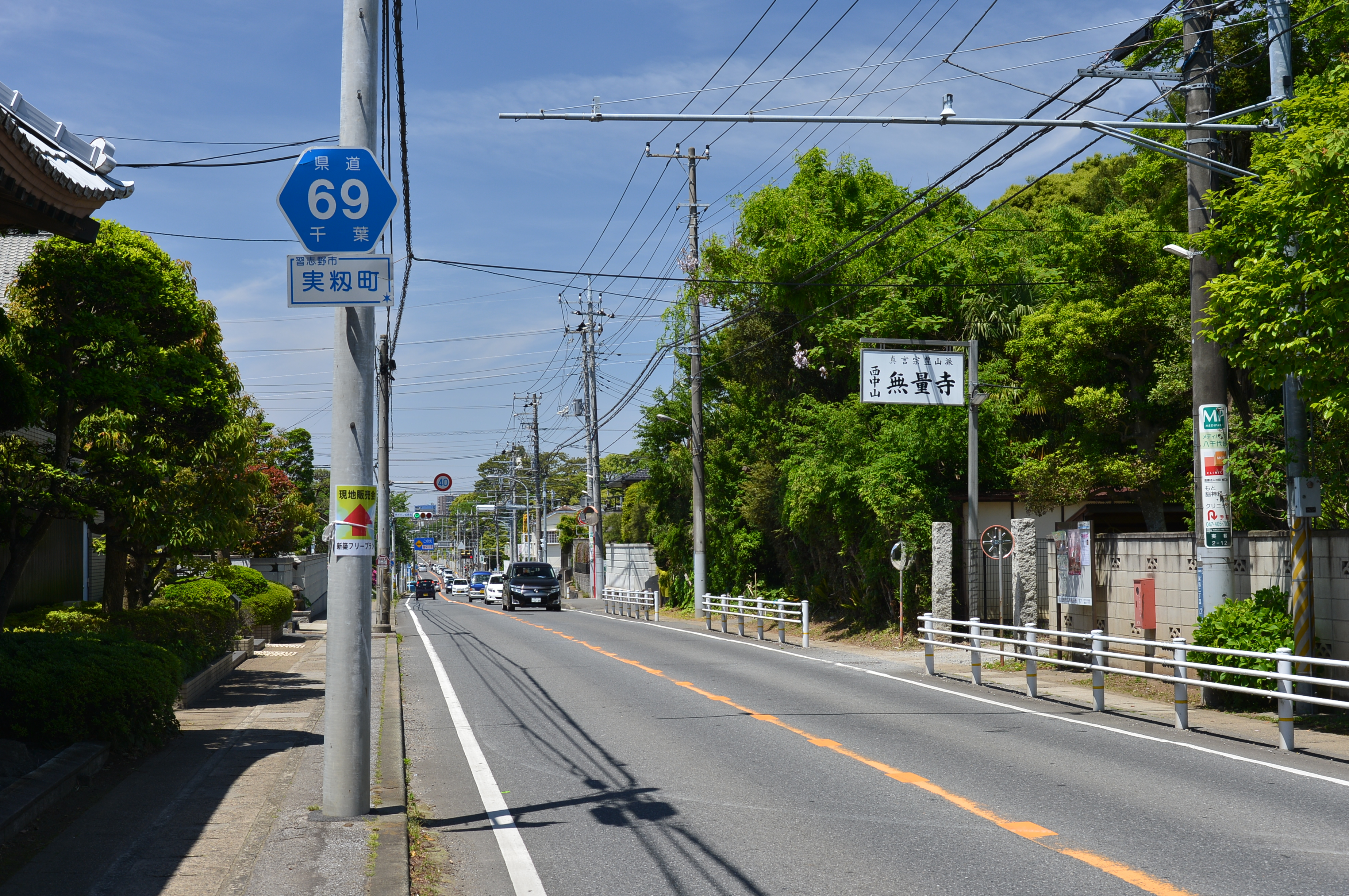 千葉県道69号長沼船橋線（千葉市花見川区実籾）